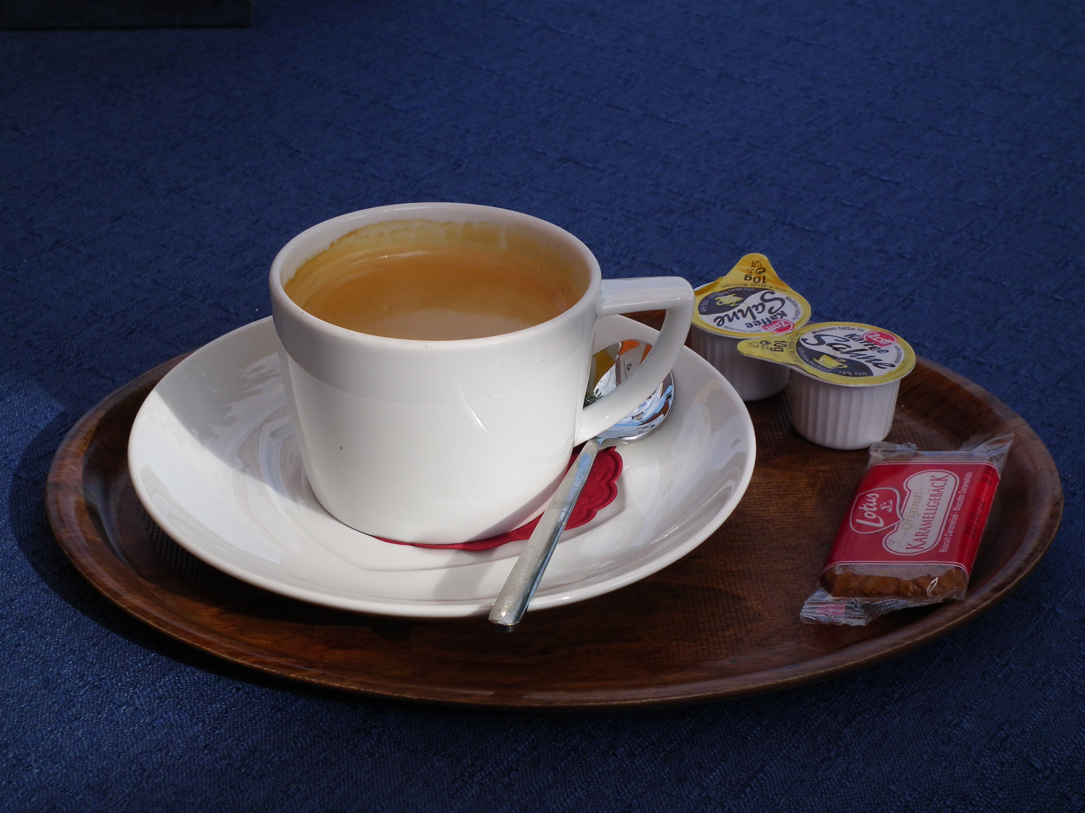 Tasse Kaffee mit Kondensmilch und Gebäck